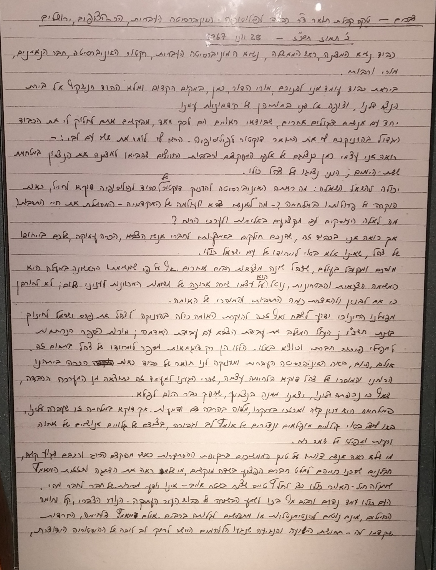 נאום הר הצופים של יצחק רבין טיוטה בכתב ידו